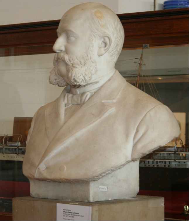 Fotografie einer Marmorbüste von Johann Georg Lohmann (1830-1892), Direktor des Norddeutschen Lloyd von 1877 bis 1892